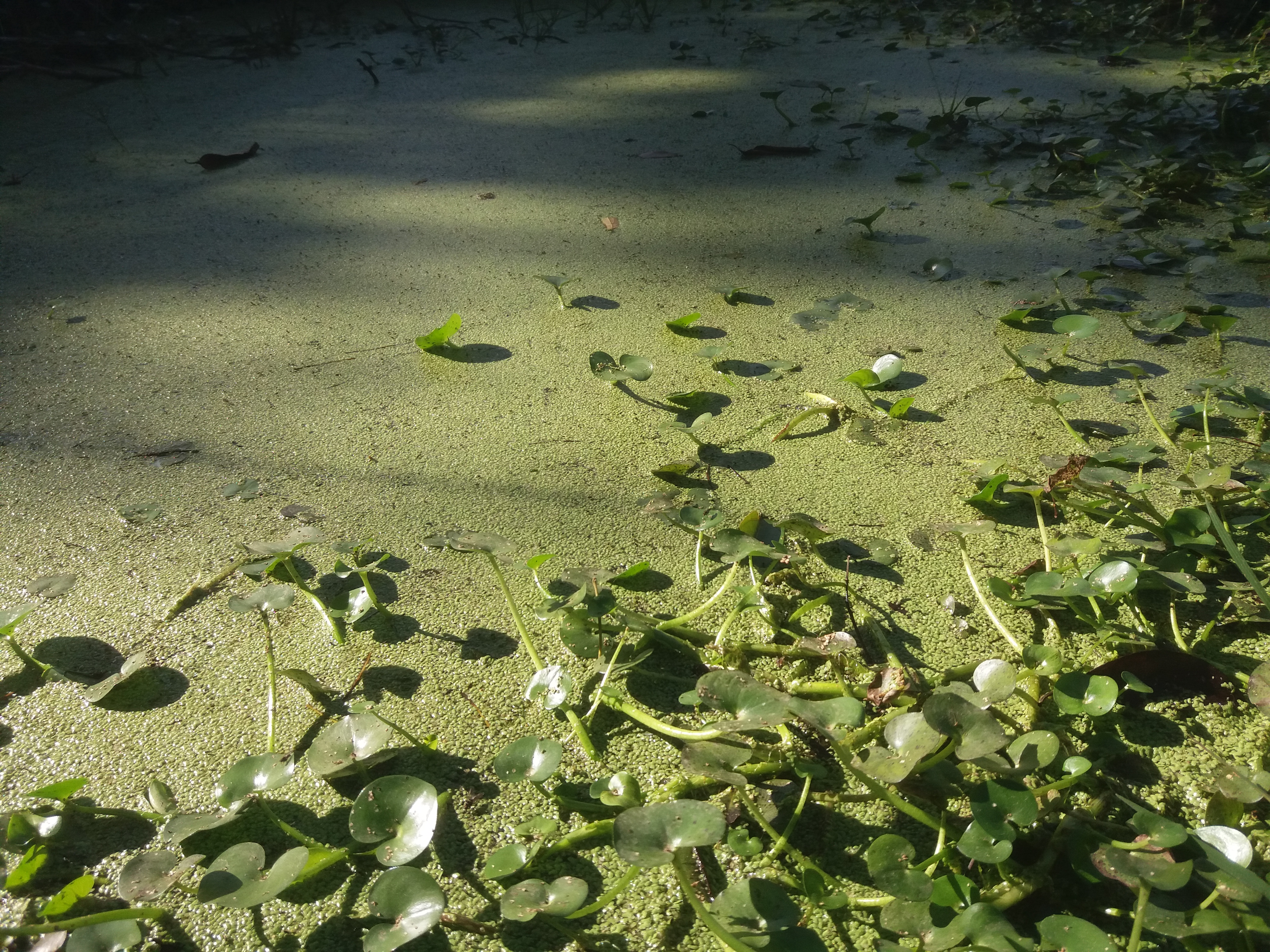 Lagoa em uma nascente em Alto Paraguaçu, Itaiópolis SC